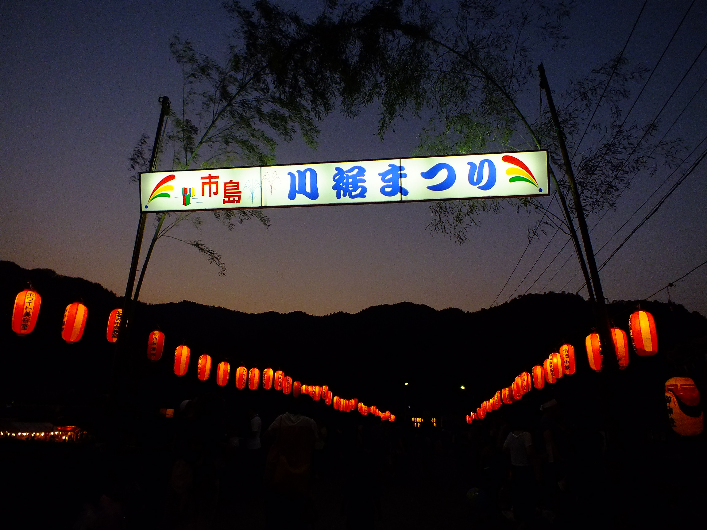 20140729 Ichijima-Kawasuso Matsuri 市島川裾祭（丹波市市島町）竹田川